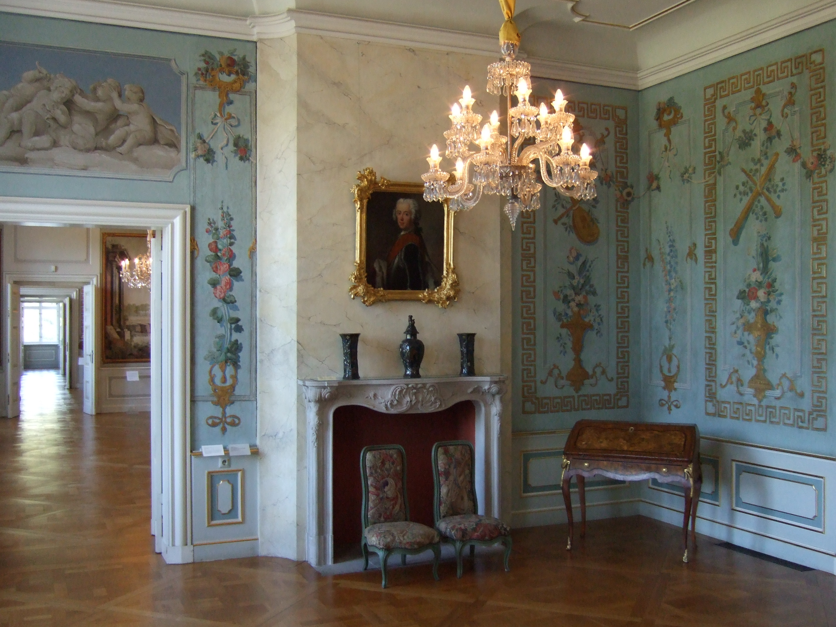 Das sogenannte Musikzimmer im Erdgeschoss von Schloss Friedrichsfelde hat eine Wandbespannung aus Schloss Ostrau. Die Leinwandtapete ist um 1720/30 entstanden und zeigt auf bläulichem Grunde eine goldgerahmte Felderteilung, deren Flächen mit Blumen und Musikinstrumenten geschmückt sind. In der Zeit, als Schloss Ostrau in ein Internat umgestaltet wurde, wurde die Tapete nach Schloss Friedrichsfelde übertragen. Der Sandstein-Kamin im Rokokostil ist eine Kopie nach einem Rheinsberger Vorbild.